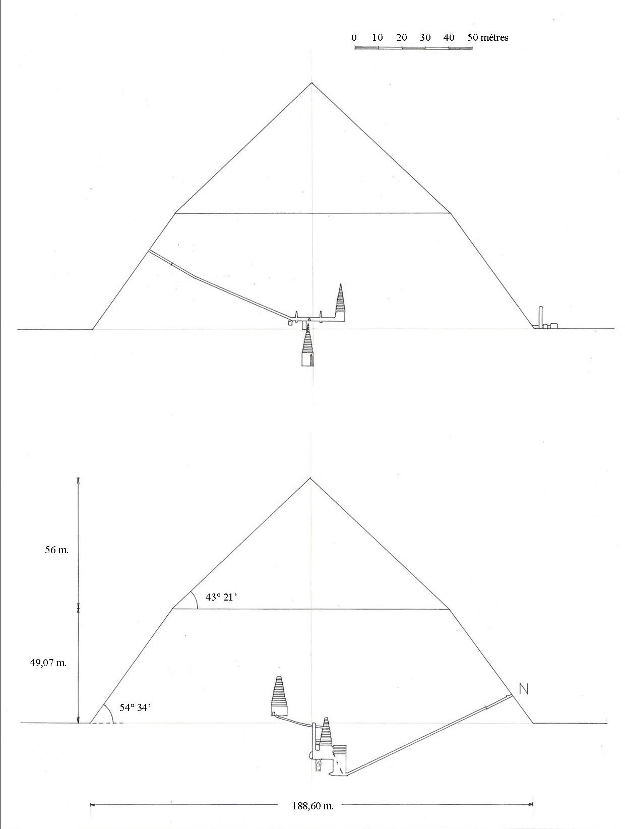 Plans en coupe des appartements funéraires de la pyramide rhomboïdale de Snéfrou à Dahchour